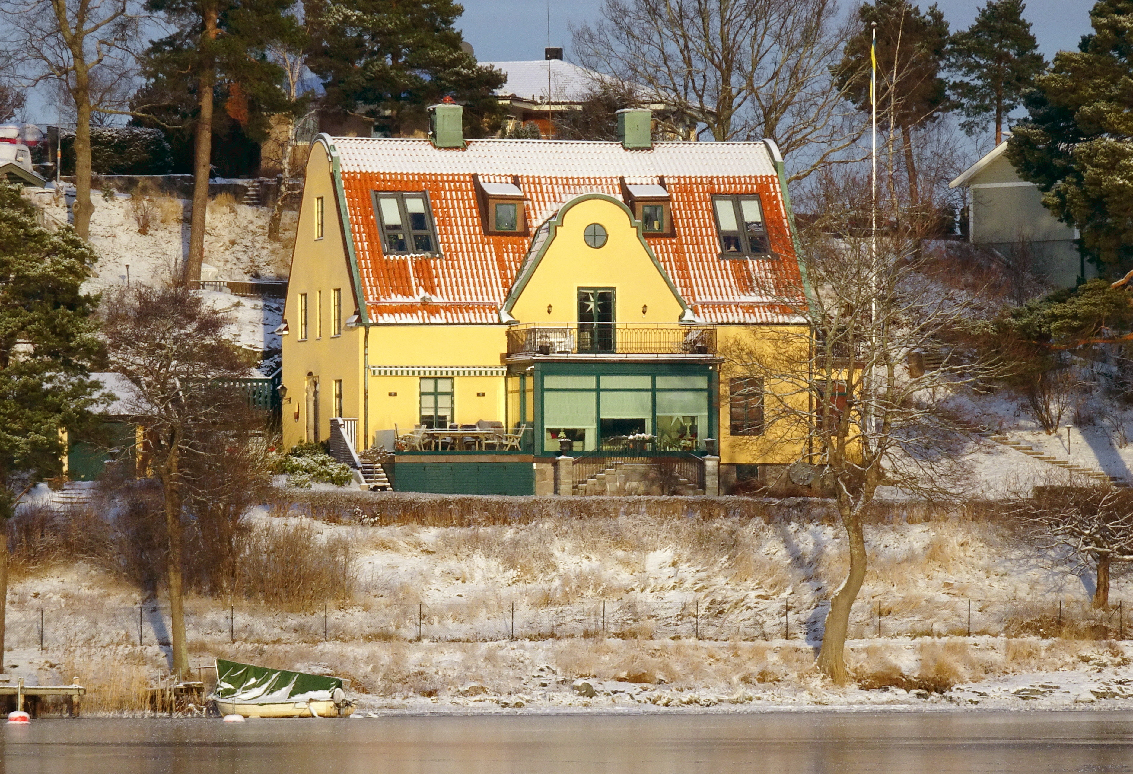 Grosshandlaren Theodor Nygrens villa längst ut på Baggensudden. Villan räknas till den första som uppfördes i Saltsjöbaden och stod färdig 1892.